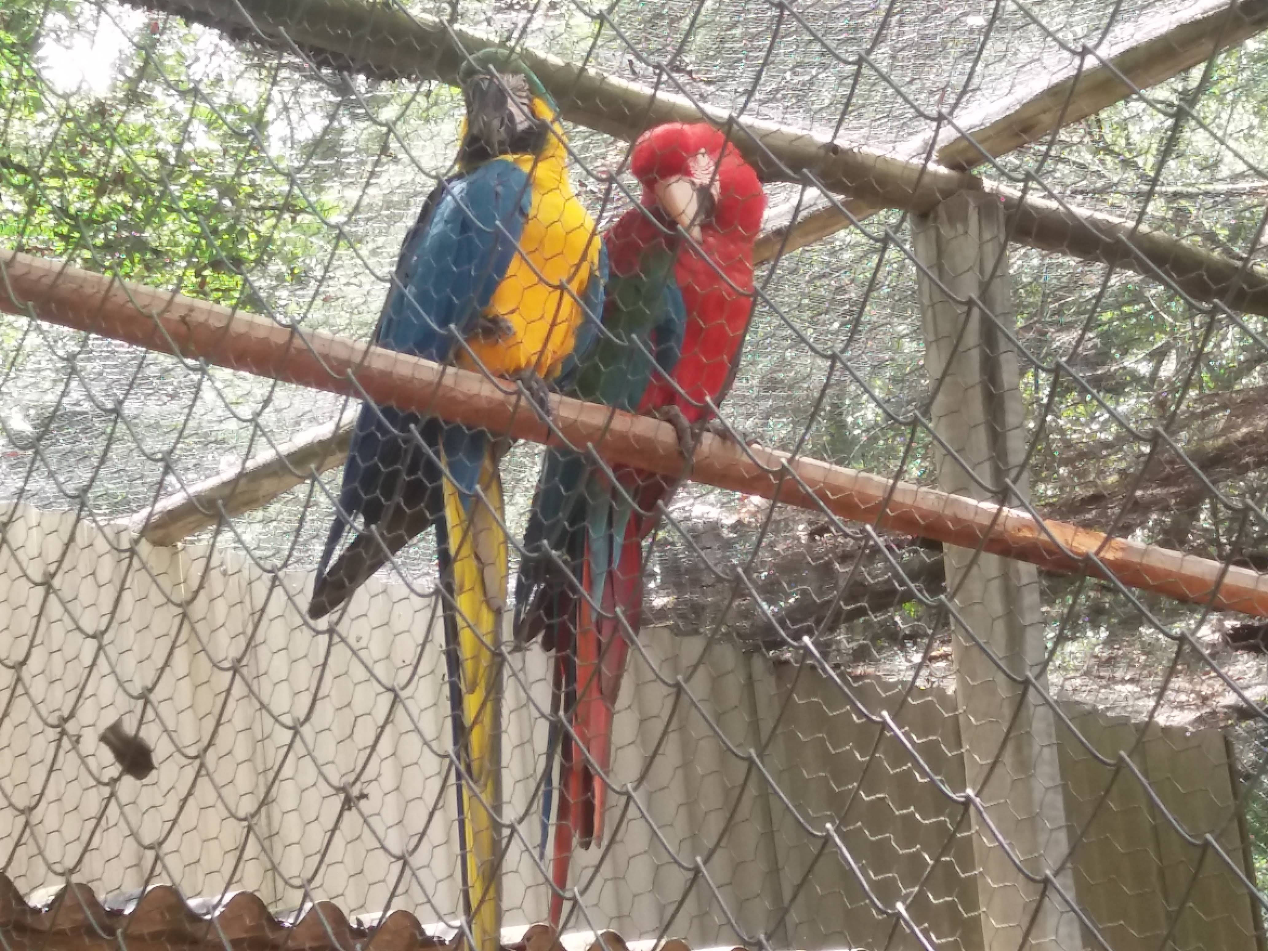 Araras em processo de reabilitação no "Viveiro Transitório de Aves Silvestres de Franca" (VITAS), dentro do Jardim Zoobotânico de Franca.